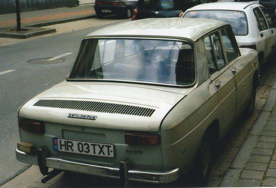 Une Dacia 1100 roumaine photographiée à Bruxelles (Belgique).